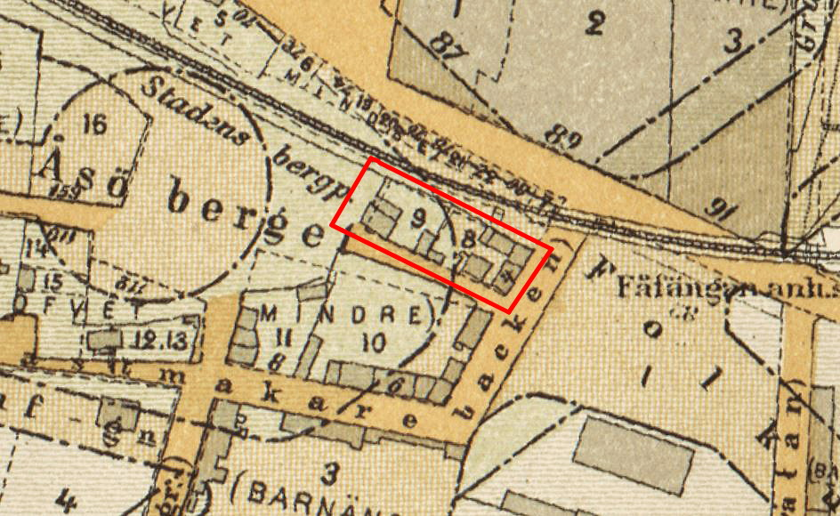 Del av karta över Stockholm visande Åsöberget och fastigheten Tjärhovet mindre 8 och 9